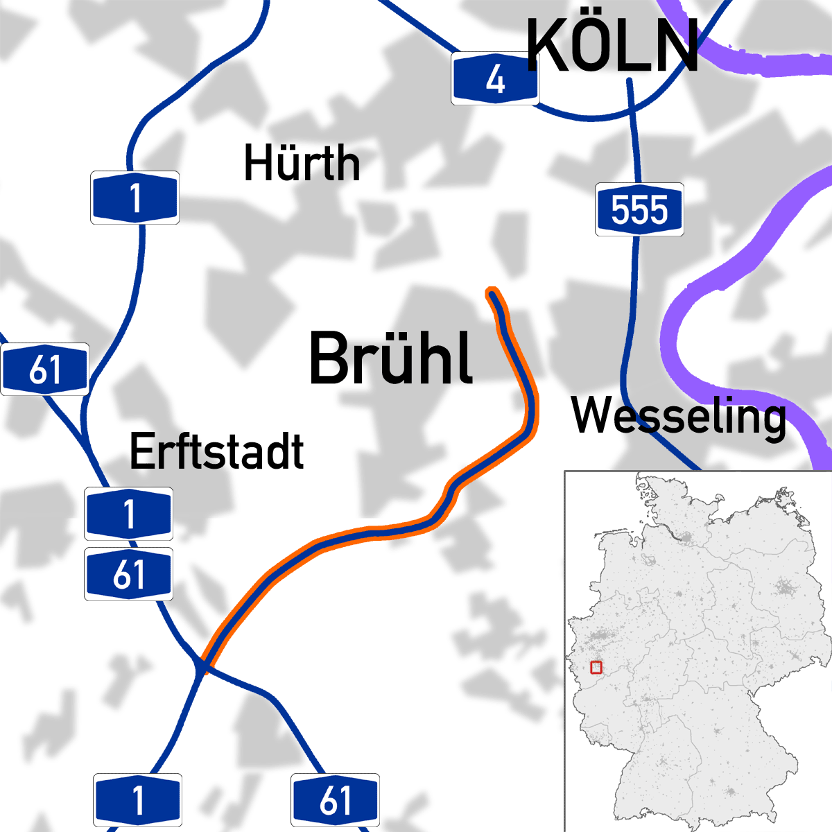 Bundesautobahn 553